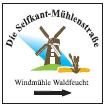 Beschilderung der Selfkant-Mühlenstraße